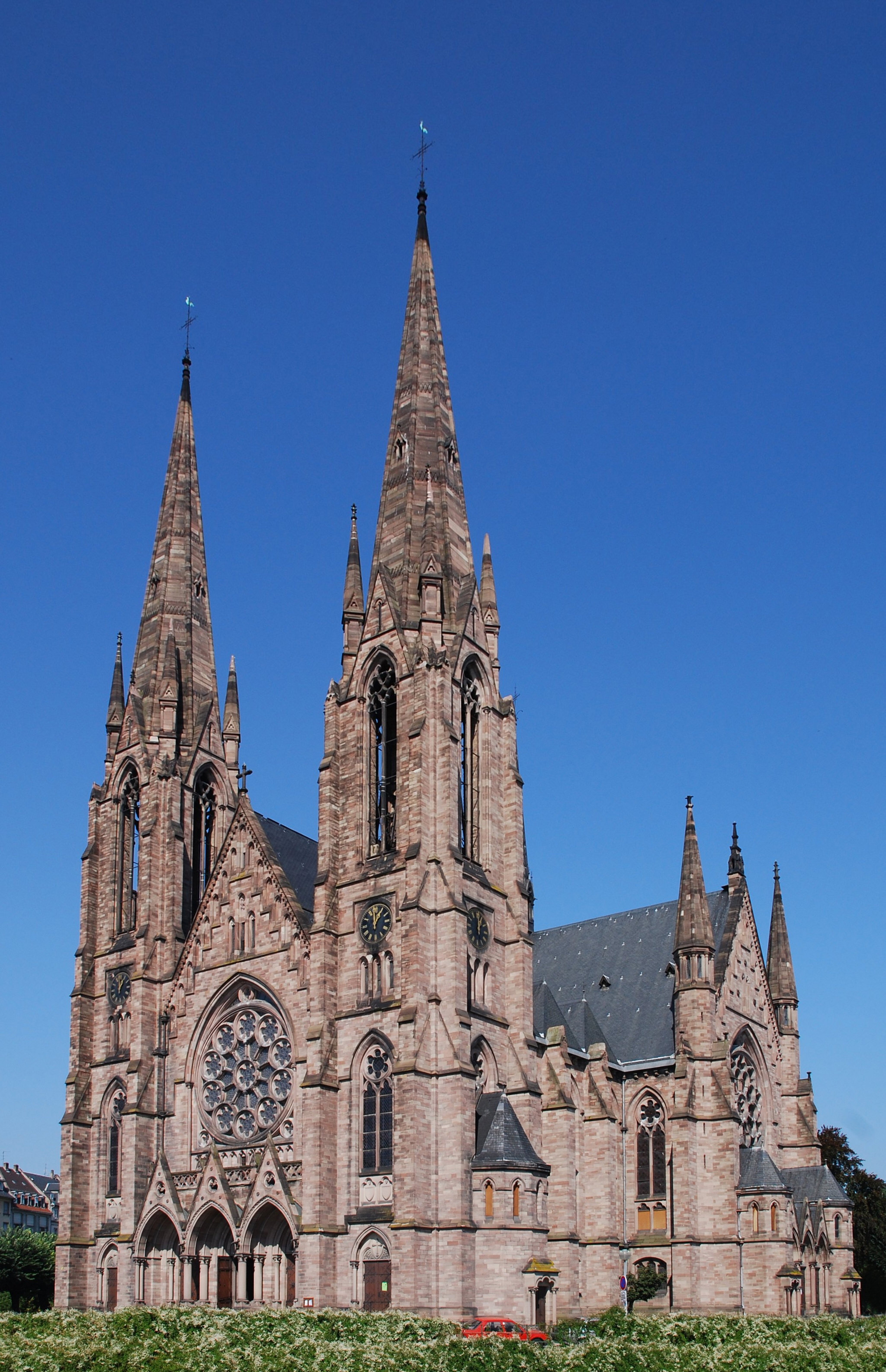 Paulskirche in Straßburg Licensing thumb|Original Uploaded with Reworkhelper